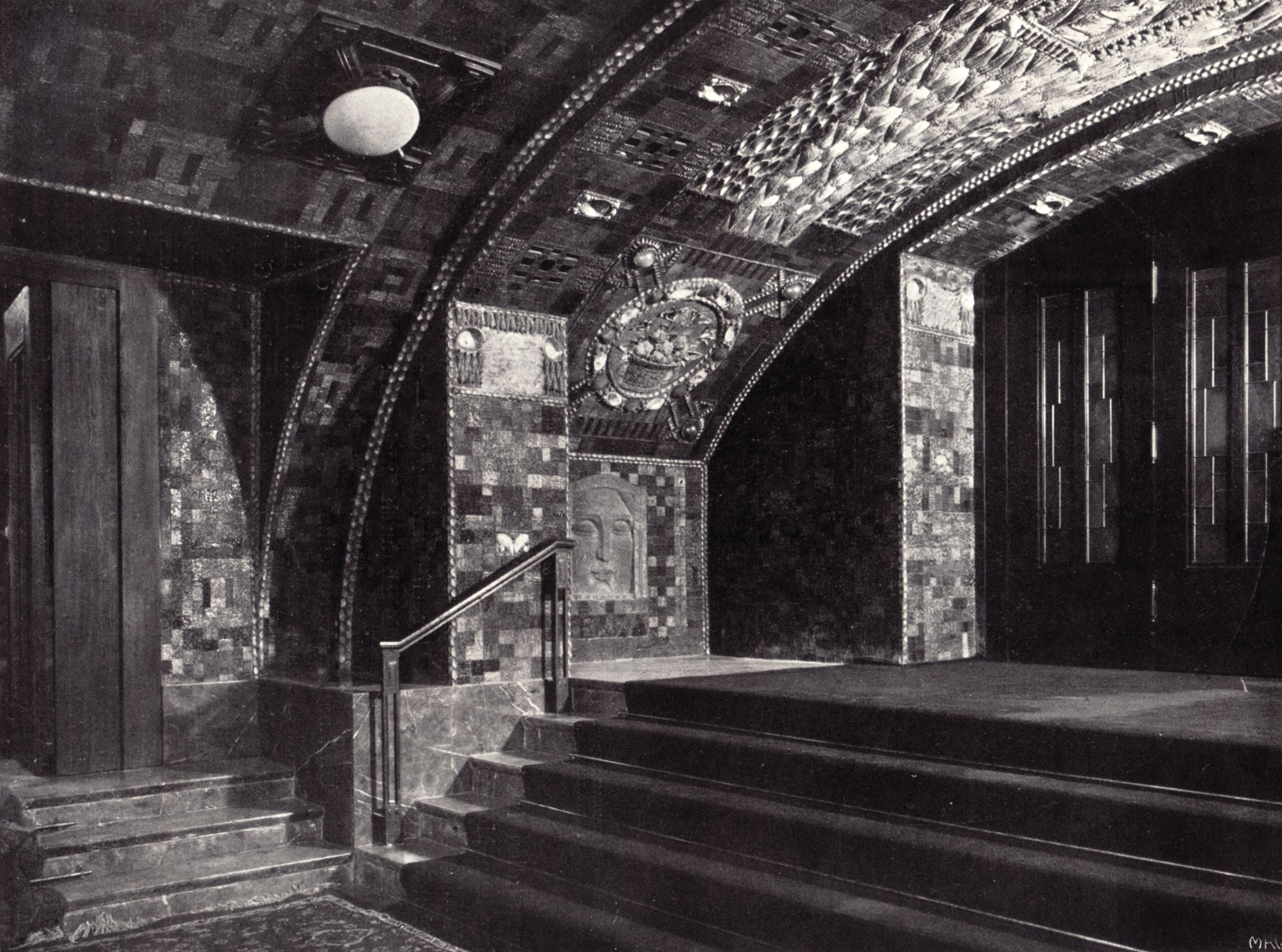 Berlin - Weinhaus Rheingold, Ansicht des Muschelsaals